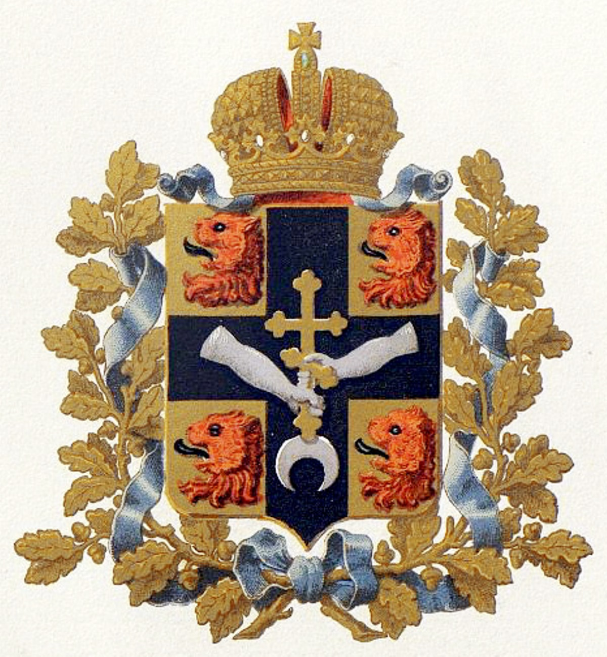 Official Russian Empire coat of arms Tiflis Governorate. Герб Российской Империи Тифлисской губернии в Гербовнике МВД. Утверждён Императором Всероссийским Александром Вторым.